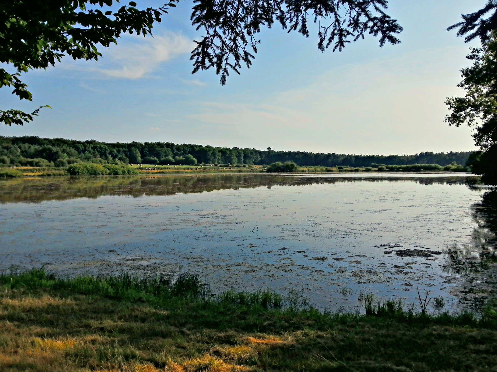 Etangs de La Pleure